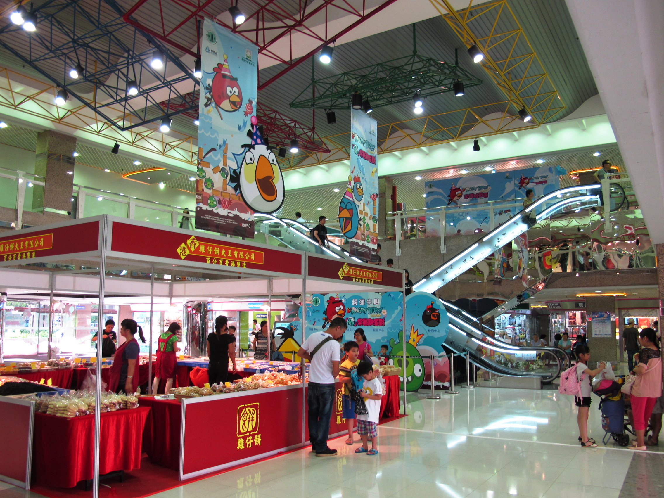 Fanling Centre Shopping Arcade 粉嶺中心購物商場